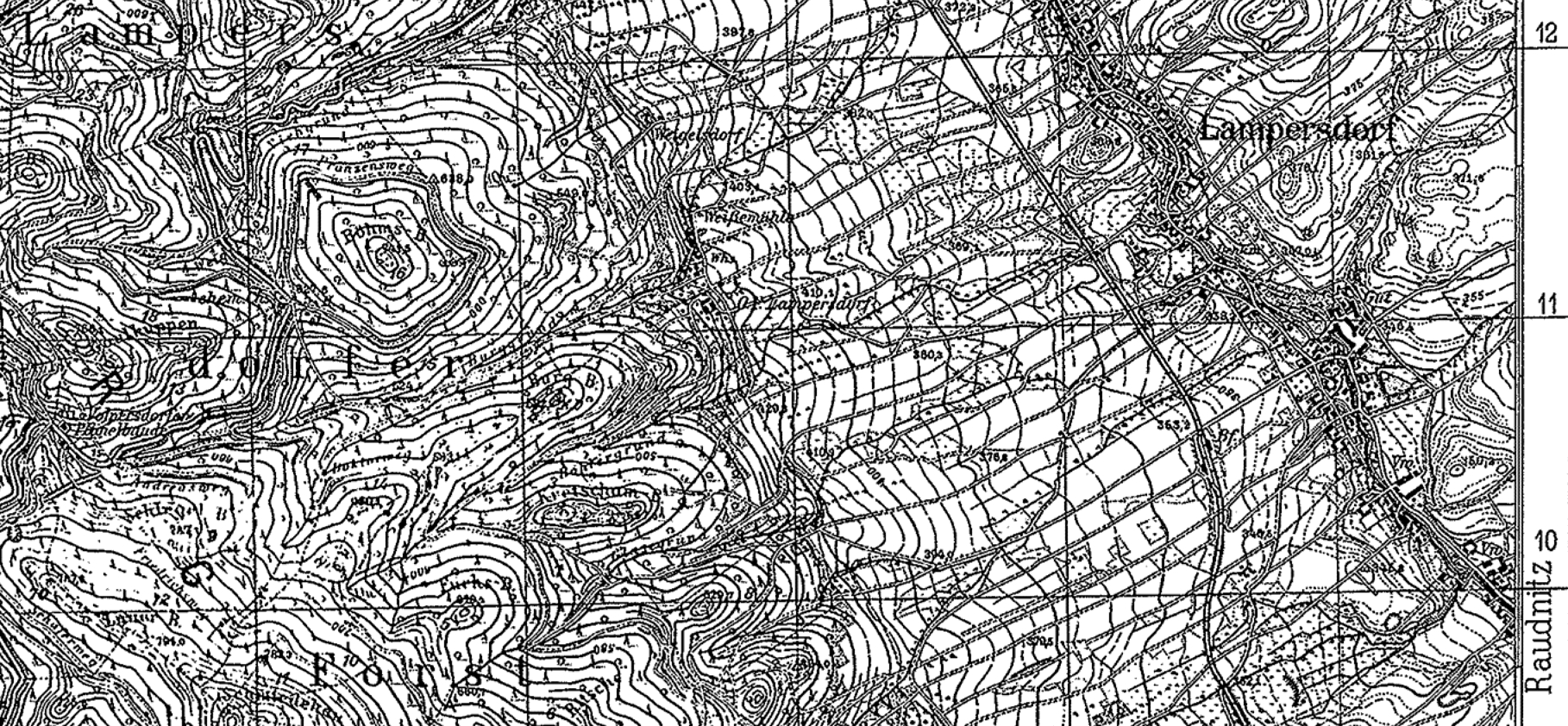 Ausschnitt Burgberg im Lampersdorfer Wald Standort der Ruine der Hannigburg